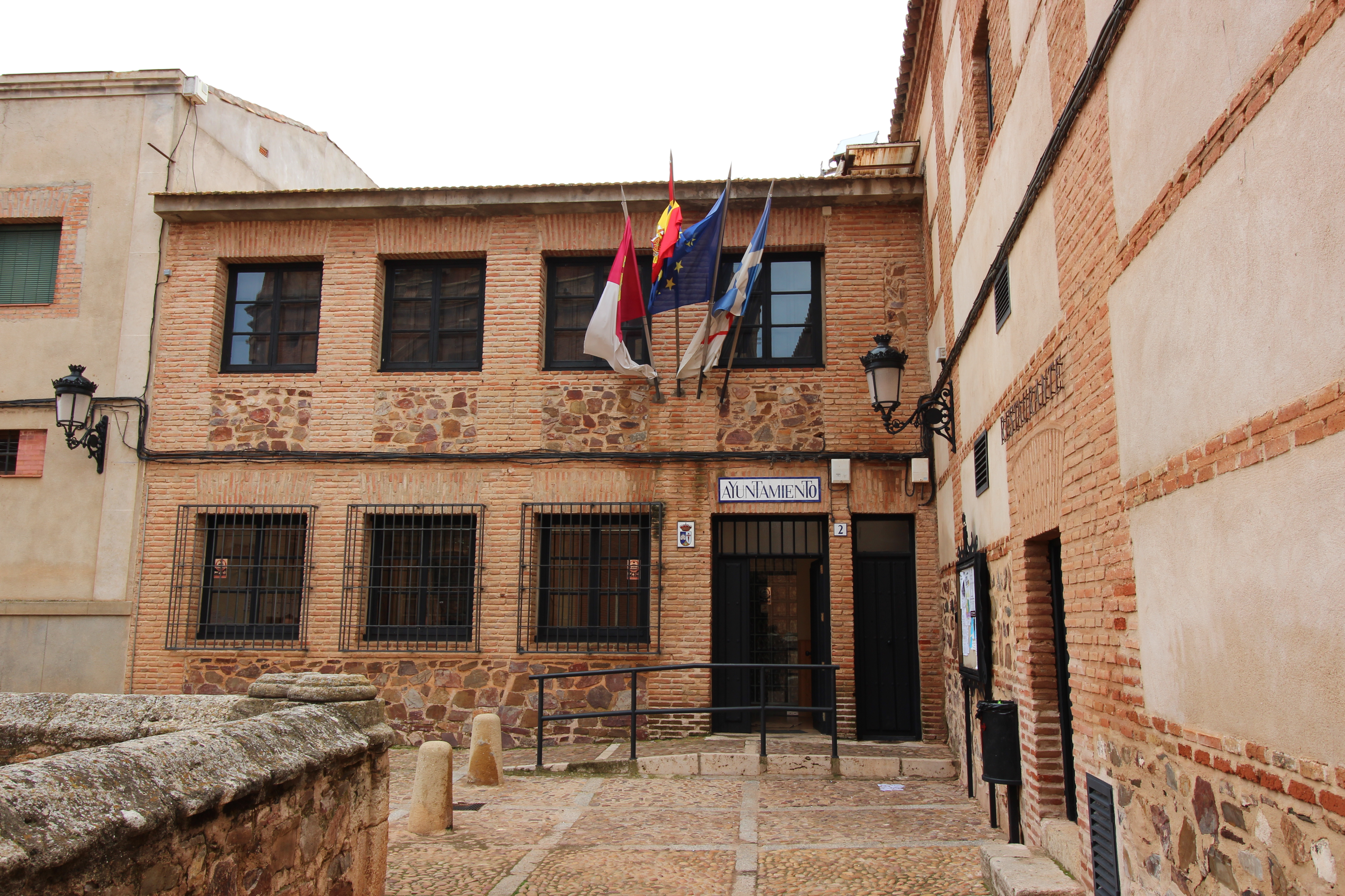 San Carlos del Valle is een gemeente in de Spaanse provincie Ciudad Real in de regio Castilië-La Mancha. Opname uit maart 2017.